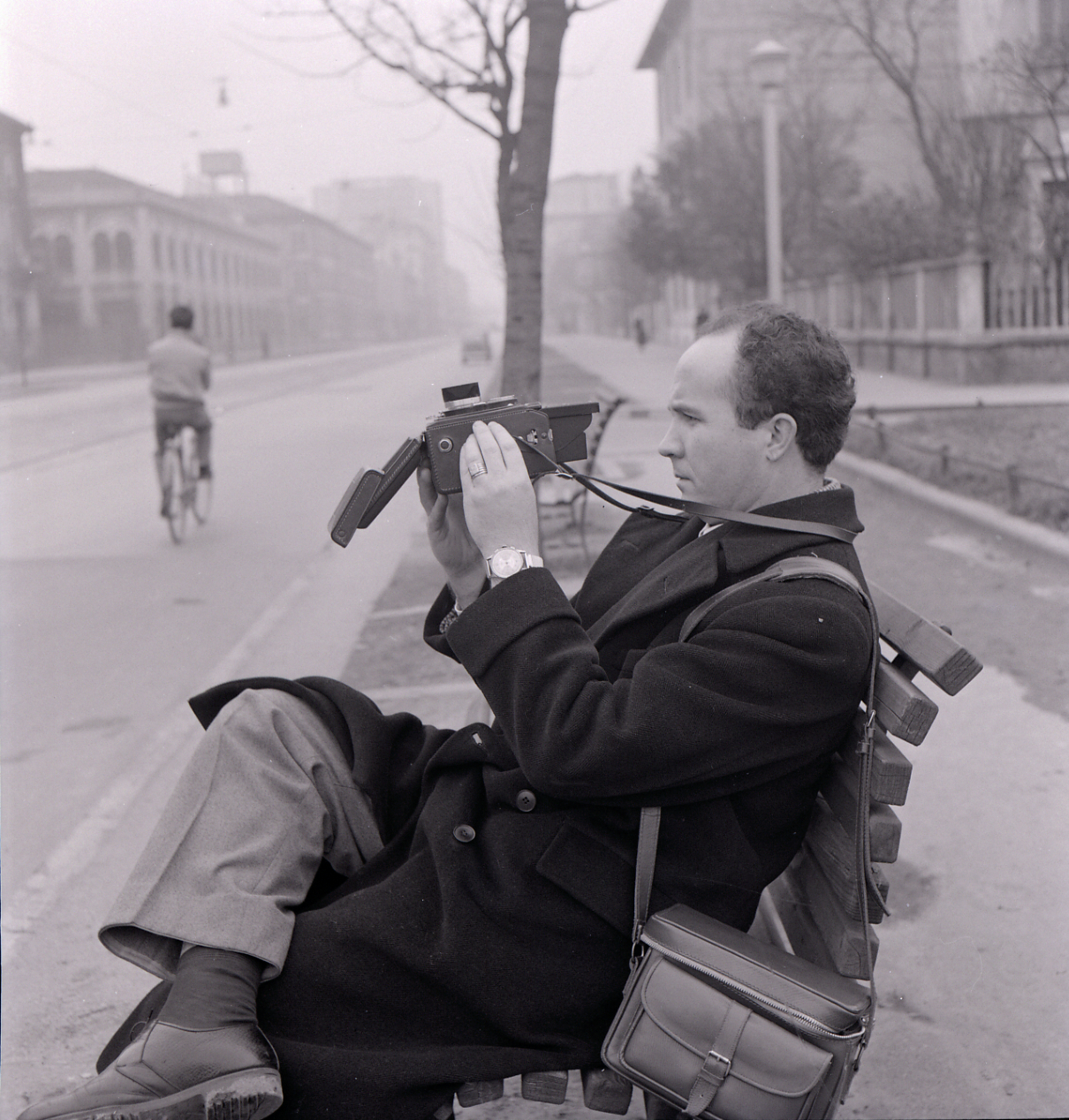 Ritratti di artisti. De Biasi. Servizio fotografico : Italia, 1982 / Paolo Monti. - Buste: 7, Fototipi: 7 : Negativo b/n, gelatina bromuro d'argento/ pellicola ; 6x6. - ((Serie costituita da 7 buste di carta, tenute insieme da una graffetta, identificate con i nn.: R4282, R4283, R4284, R4285, R4286, R4287, R4288. - Sulla busta R4282: "De Biasi"